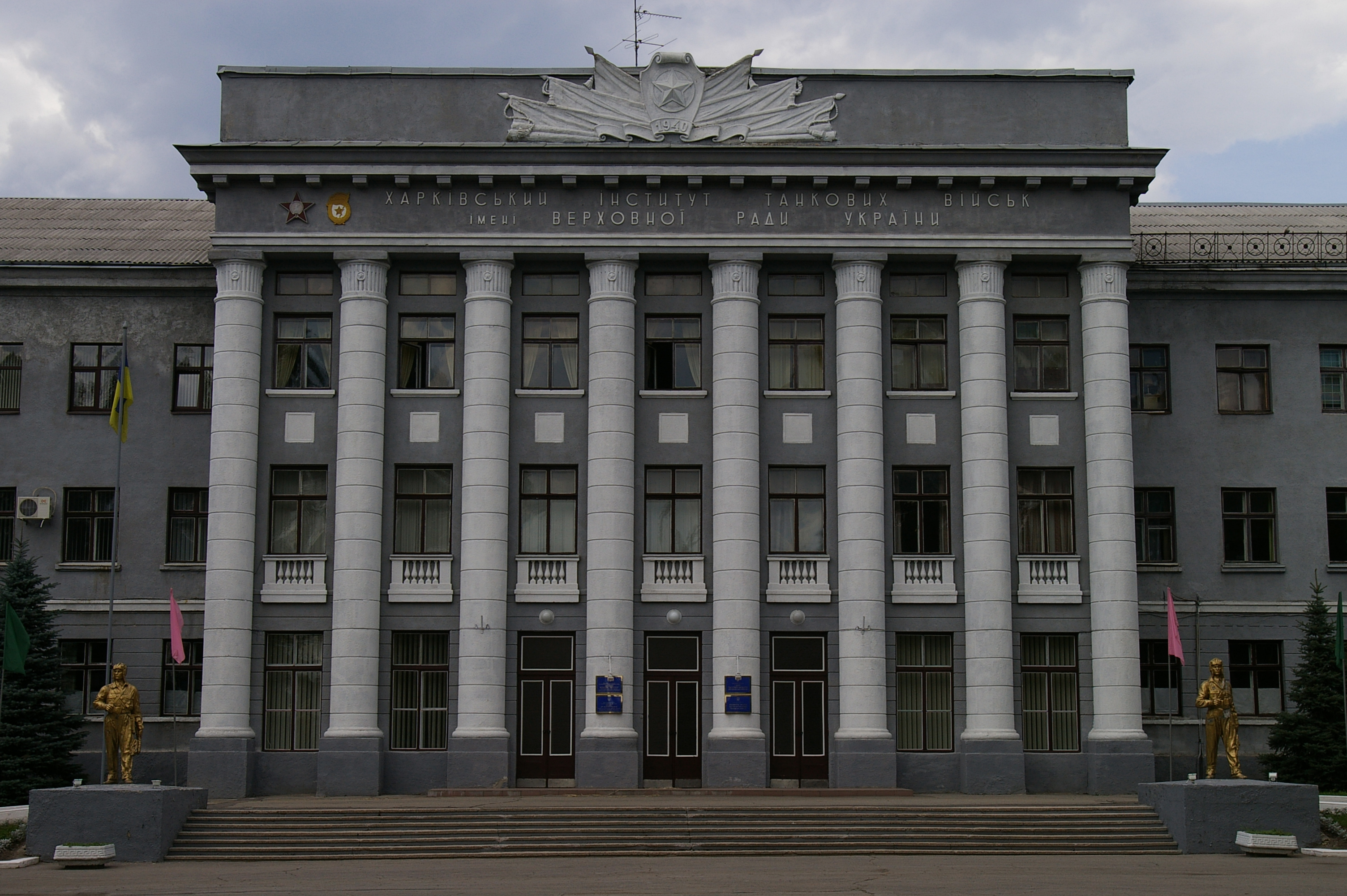 Харьков